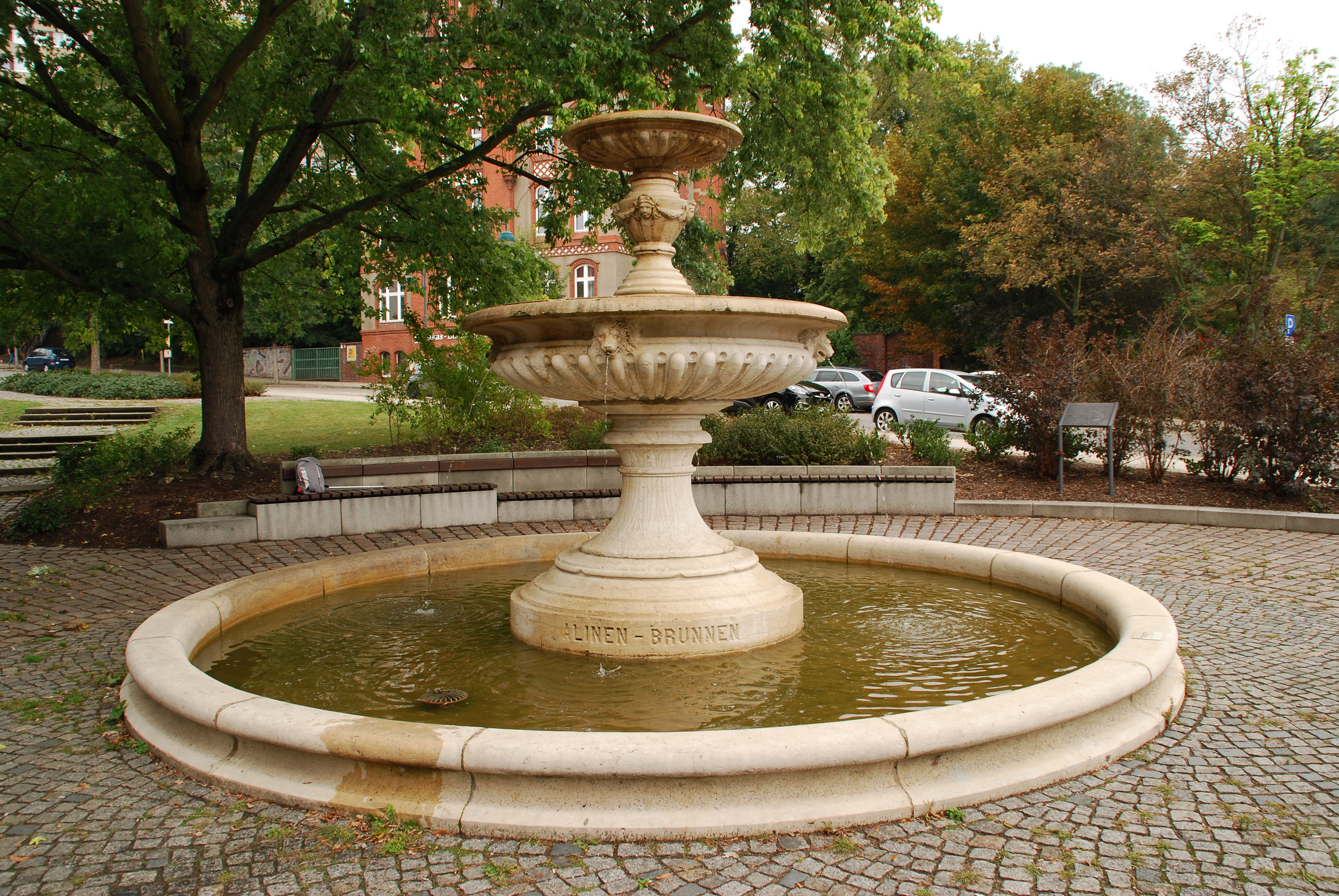 Alinenbrunnen Frankfurt (Oder)